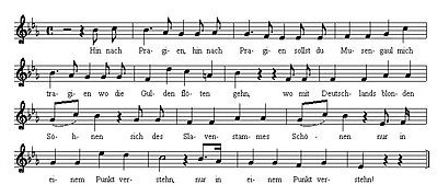 Melodie des Liedes Elegie an Prag